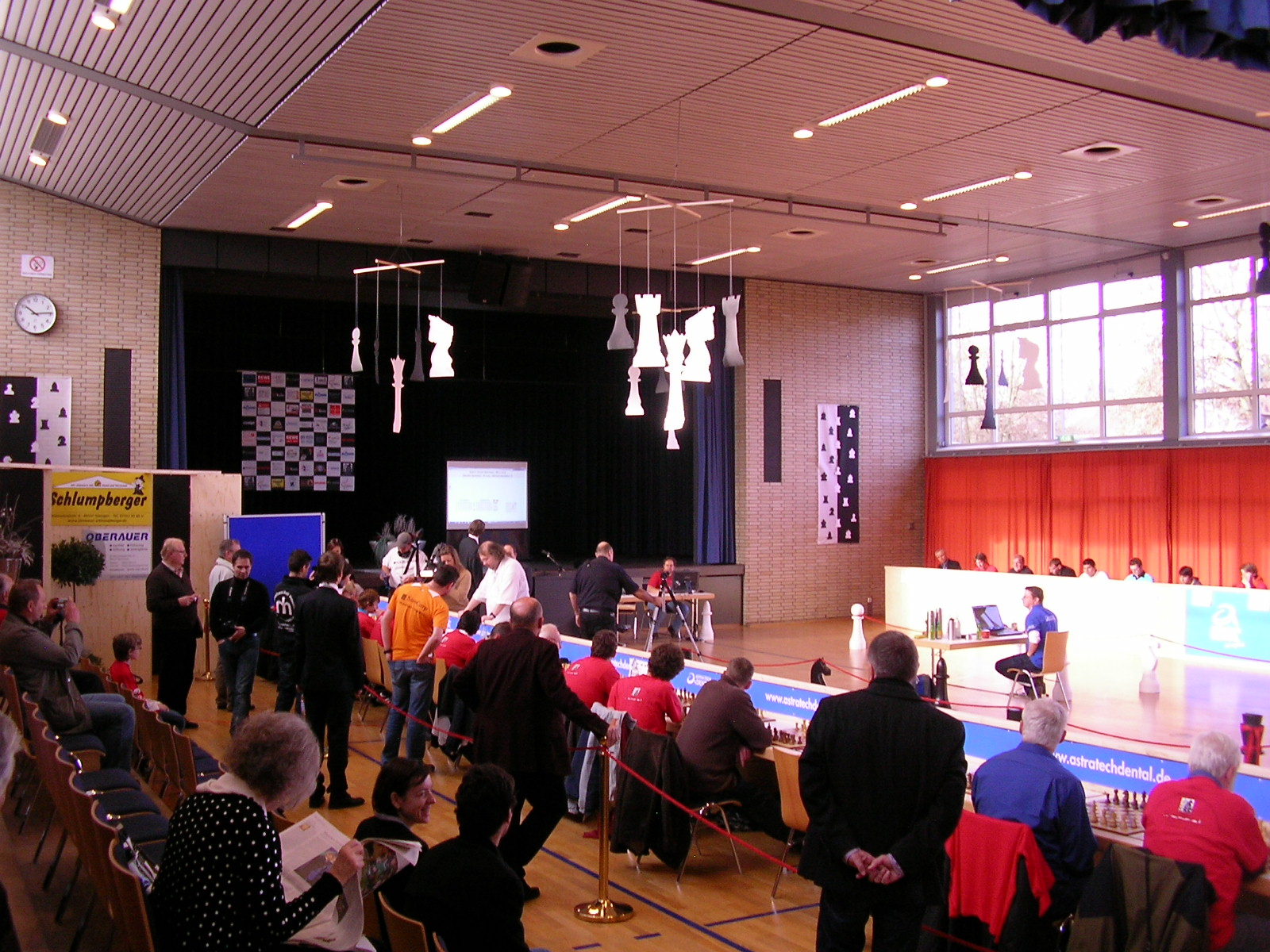 Marc Lang (rechts im blauen T-Shirt) spielt Blind-Simultan an 46 Brettern in Sontheim an der Brenz, Weltrekord November 2011.